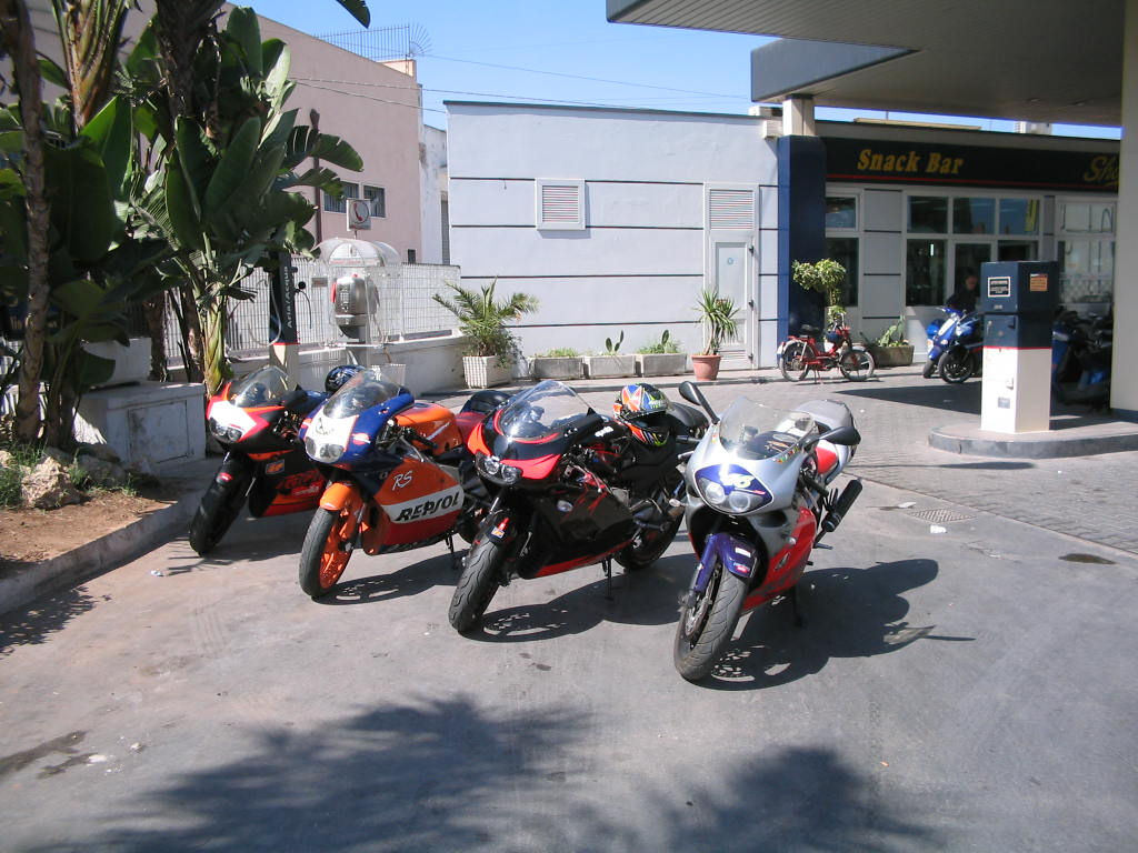 Quattro Aprilia RS 125 in un moto-raduno.